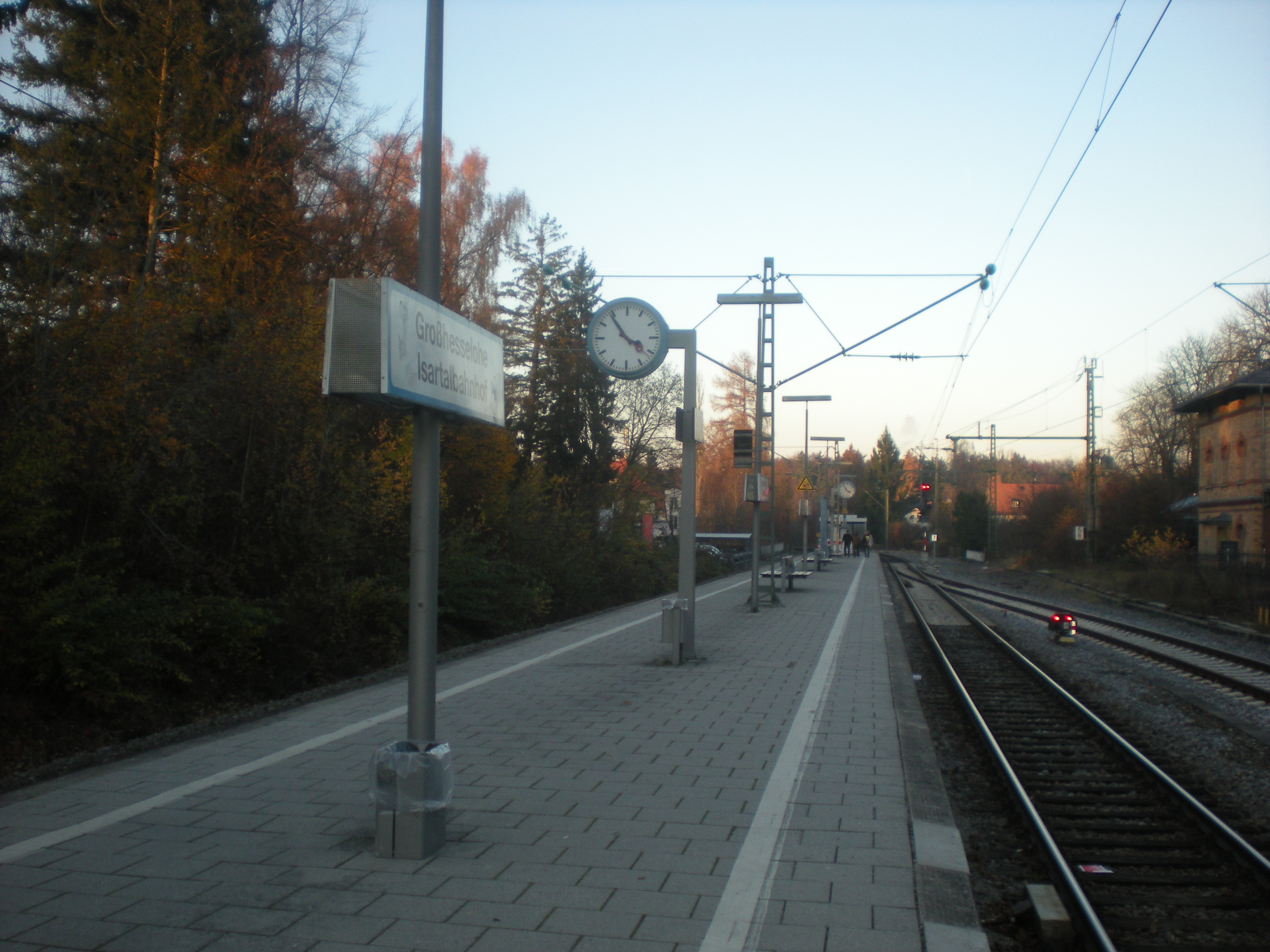 Mittelbahnsteig des Großhesseloher Isartalbahnhofs